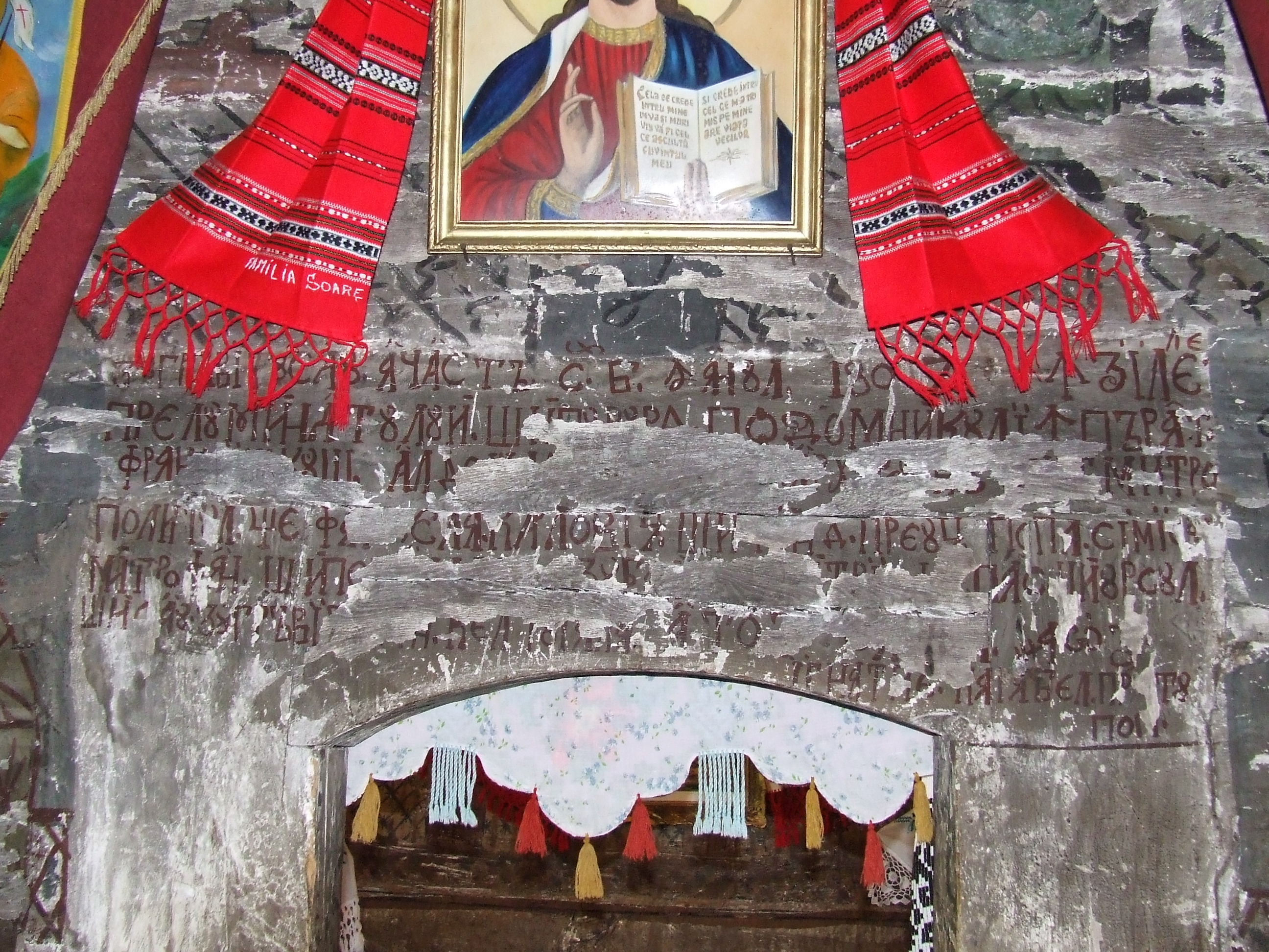 Biserica de lemn din Finişel. Inscripţia de deasupra portalului naosului.